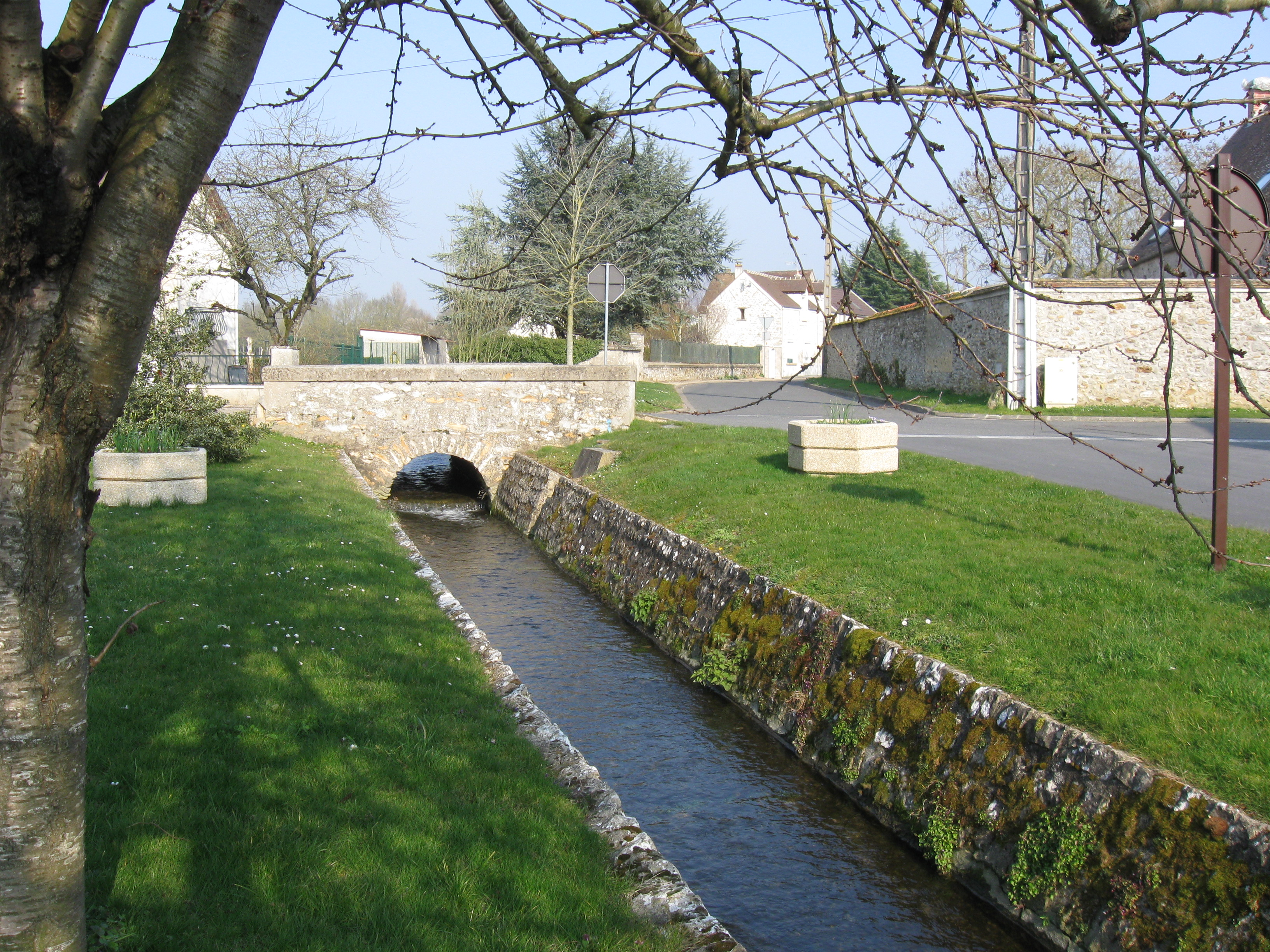 Pont dit de la Croix des Drapiers à Saint-Germain-Laxis. (Seine-et-Marne, région Île-de-France).